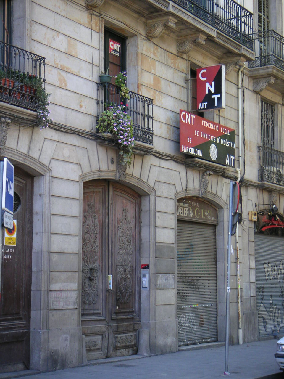 CNT-AIT office in Plaça del Duc de Medinaceli, 6, Barcelona. Photo: Soman